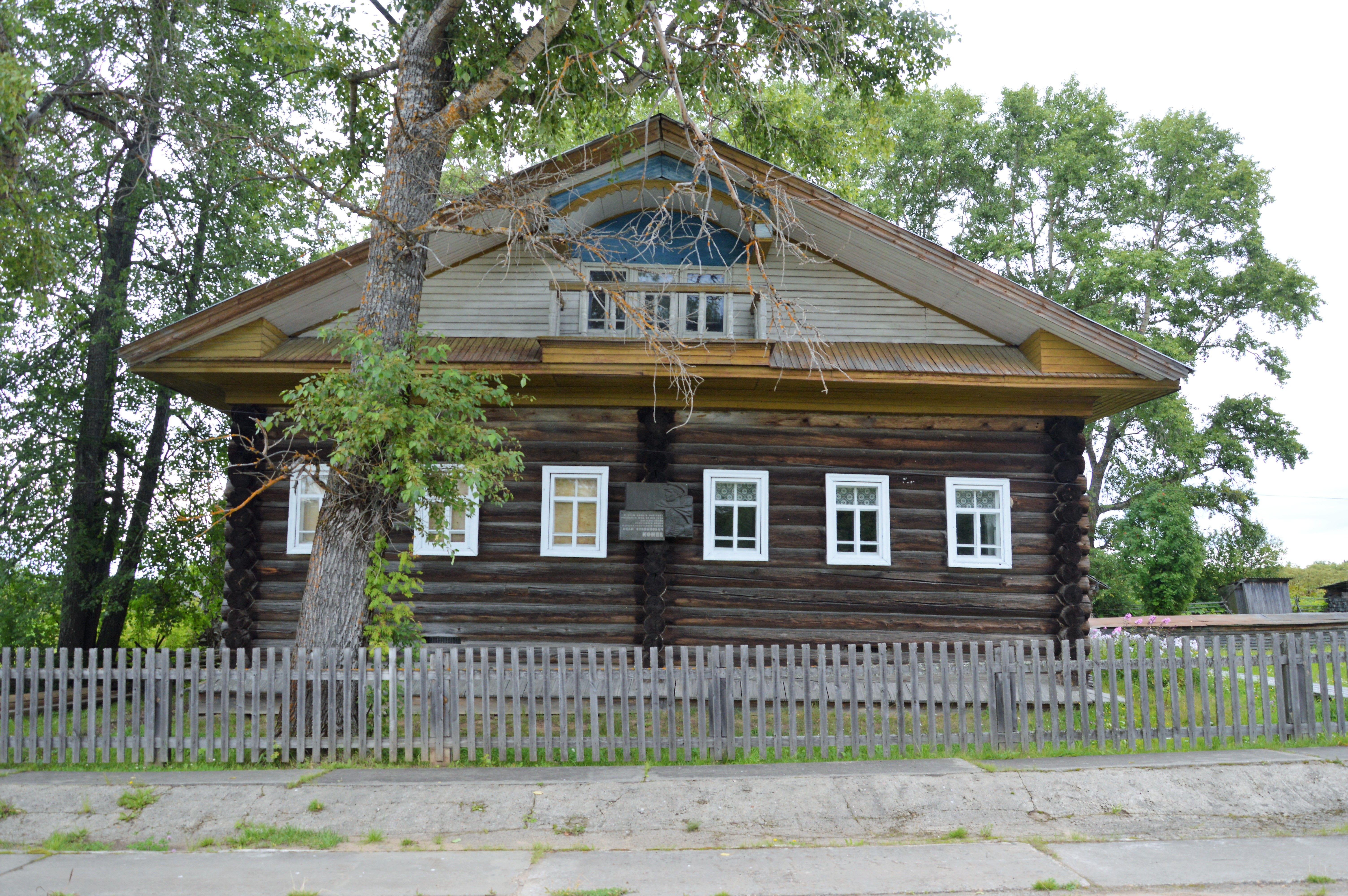 Дом, в котором родился и жил в юношеские годы дважды Герой Советского Союза, Маршал Советского Союза И.С. Конев: Лодейно, Подосиновский район, Кировская область